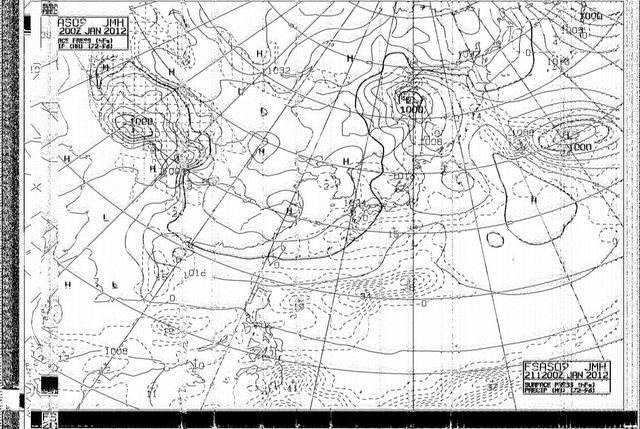 日本の気象庁が2012年1月22日に、日本列島近海を航行する船に対し放送した気象通報のひとつ。